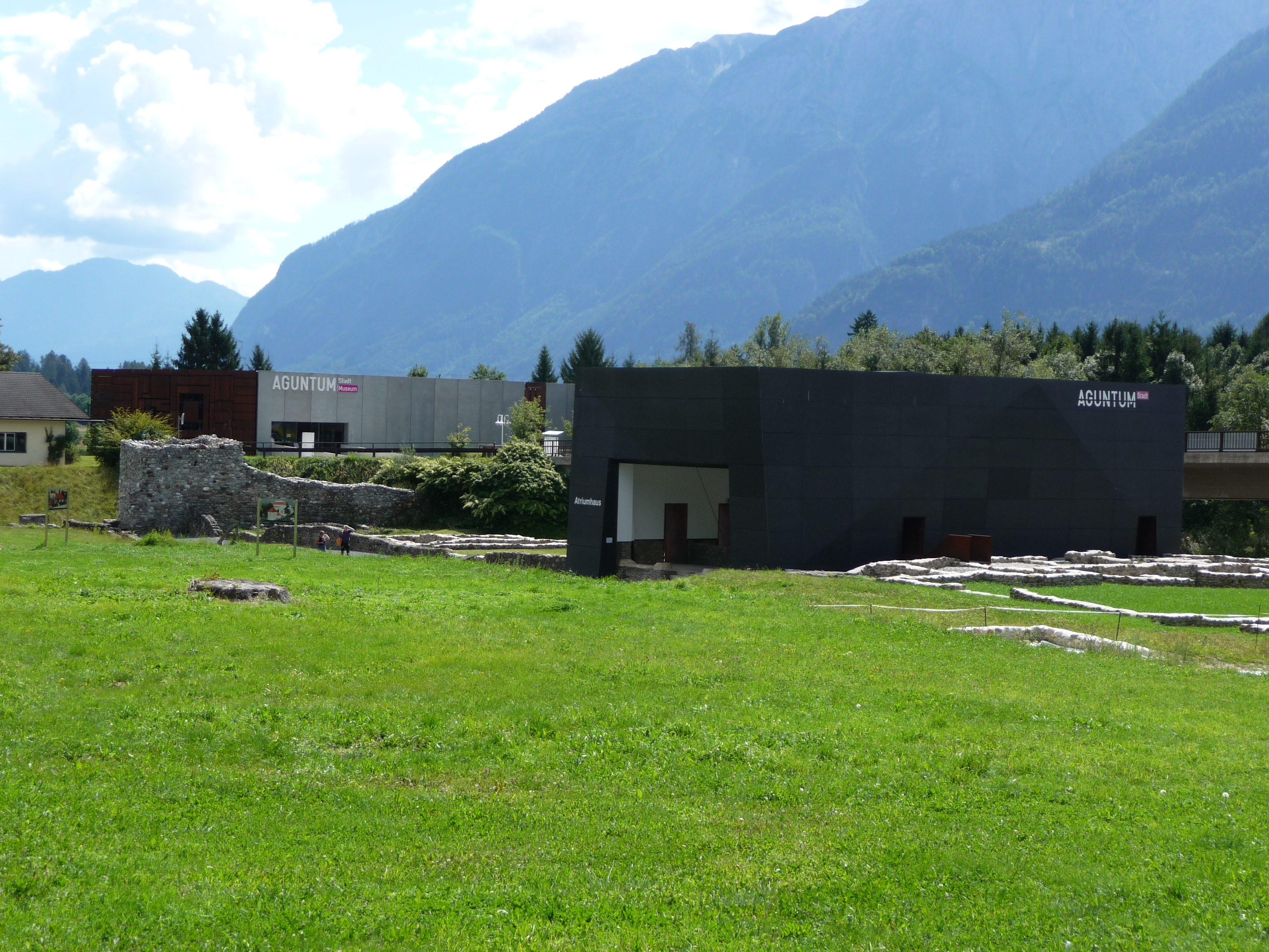 Museum (links) und Schutzbau (rechts) in Aguntum